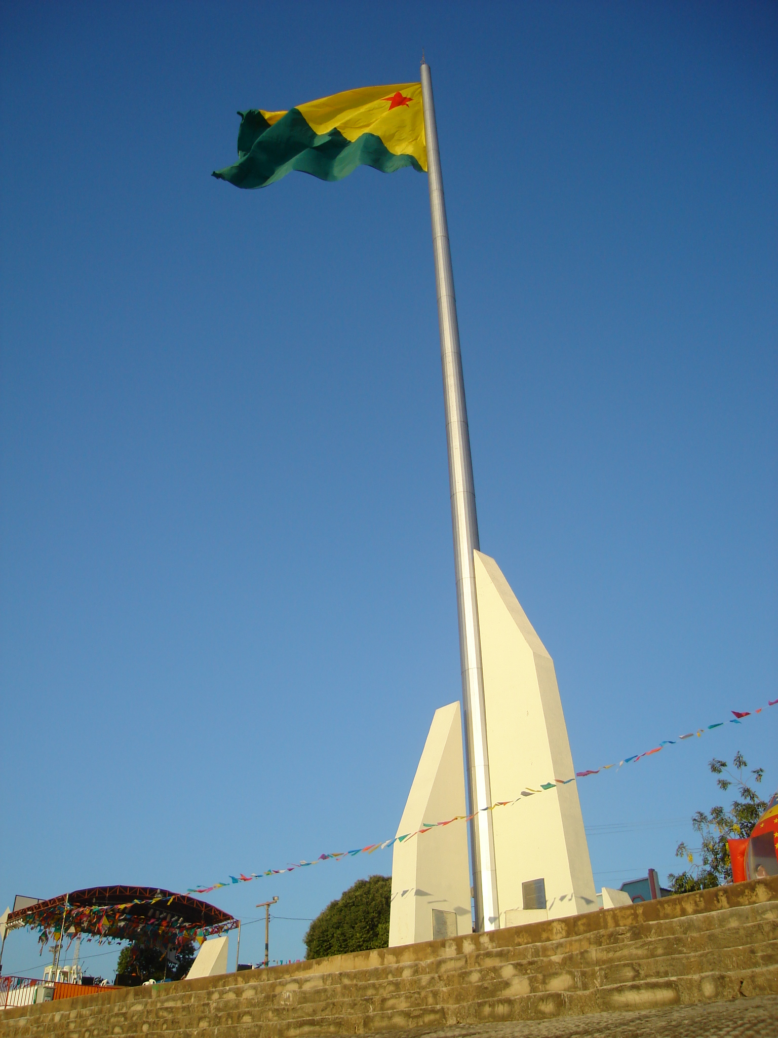 Memória ao Centenário da Revolução Acreana, Rio Branco, Acre, Brasil. Fonte Autor: Filipe Mesquita de Oliveira --Filipe Mesquita responde20px 02:14, 27 Julho 2006 (UTC)